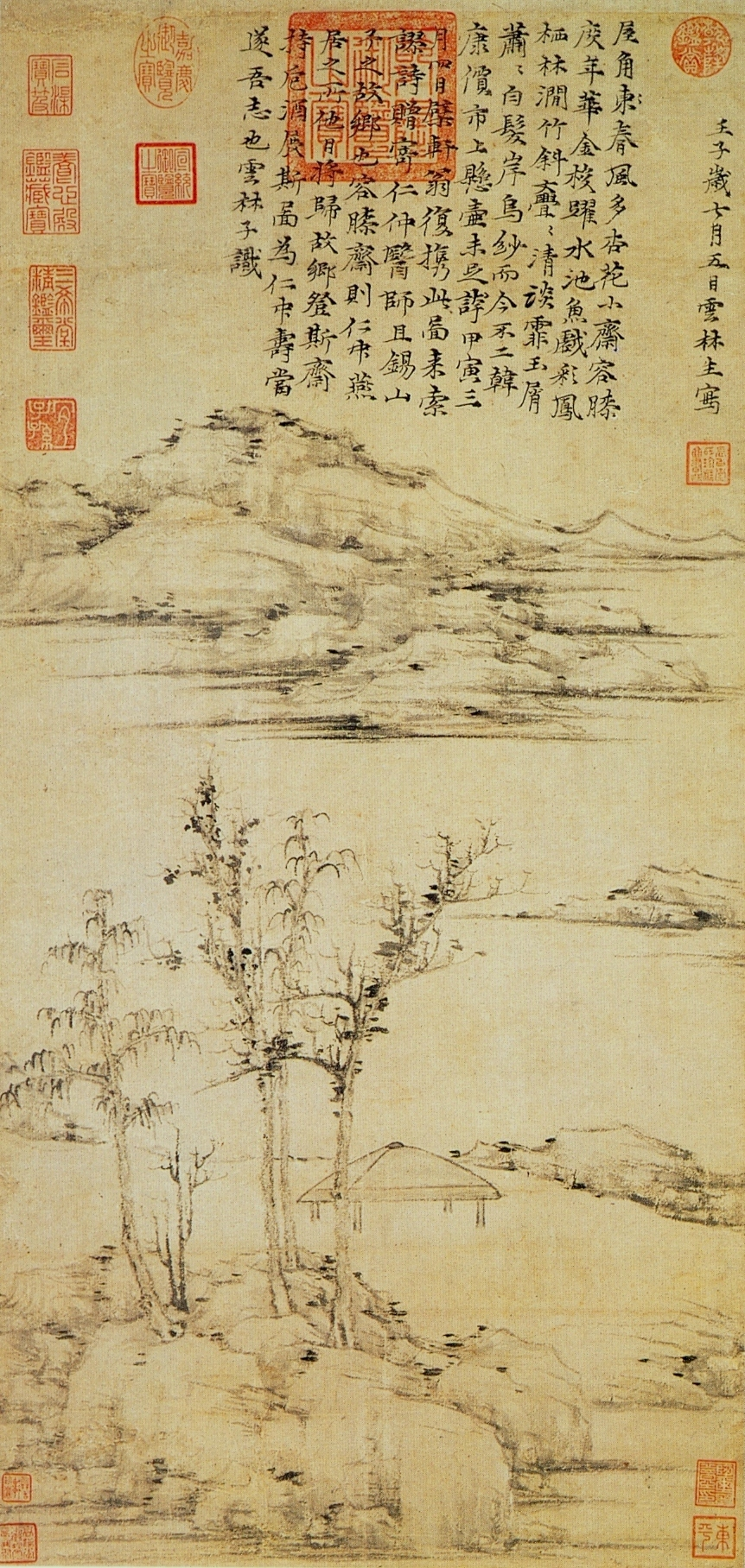 Ни Цзань Мастерская Жонси. Гугун, Тайбэй